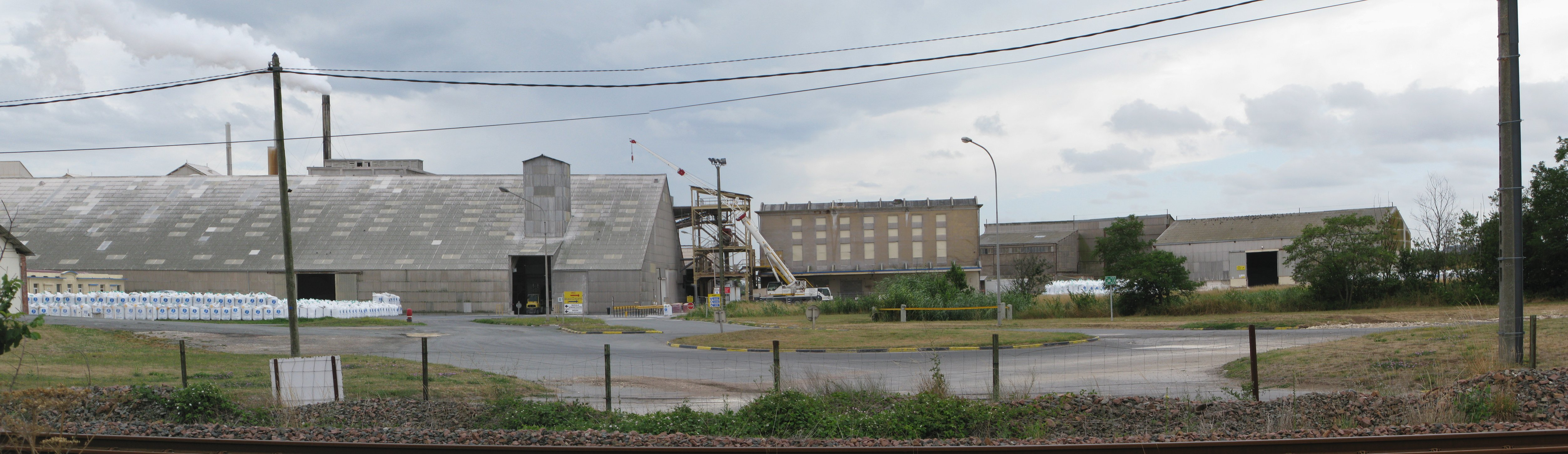 Panorama de l'usine Asturienne, Tonnay-Charente